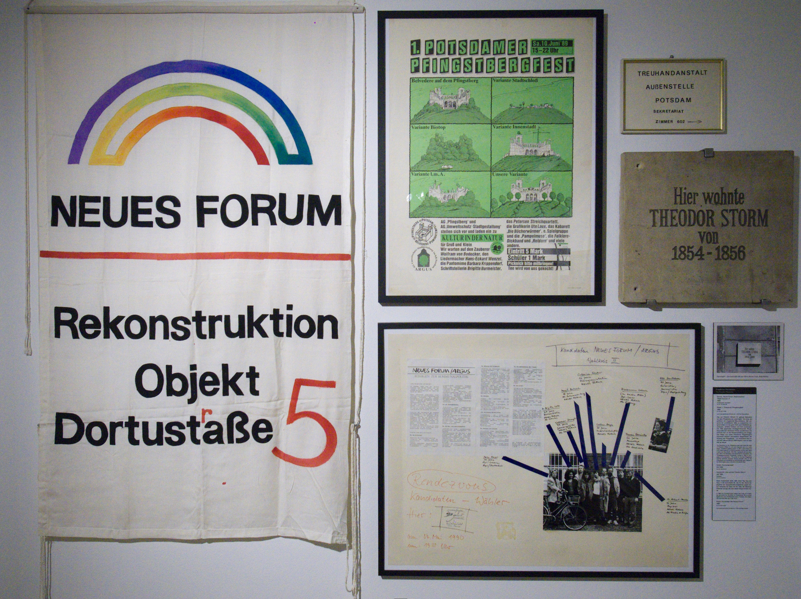 Ausstellungsstücke zu Neuem Forum und ARGUS im Potsdam Museum